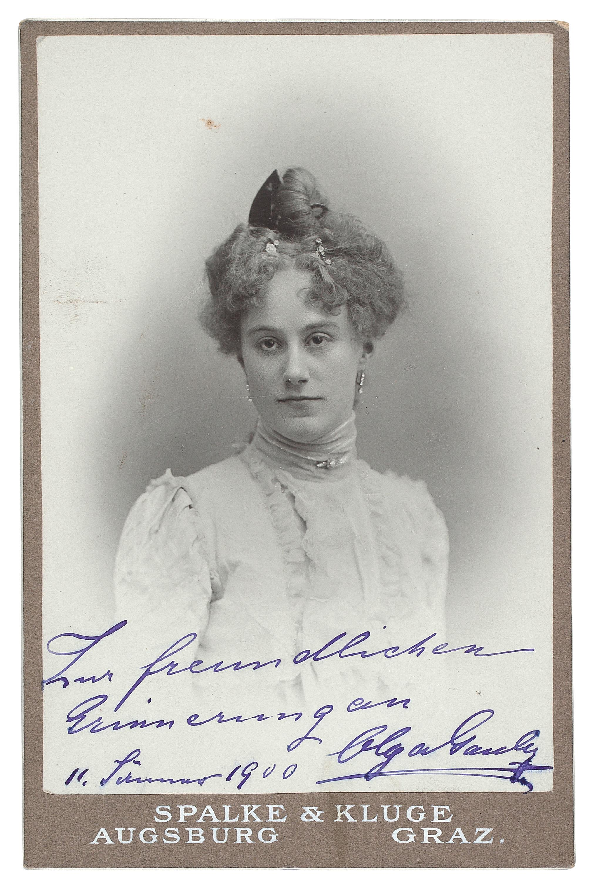 Olga Gauby (aus einem Nachlass-Konvolut), datiert und unterschrieben von Olga Gauby, 11. Jänner 1900